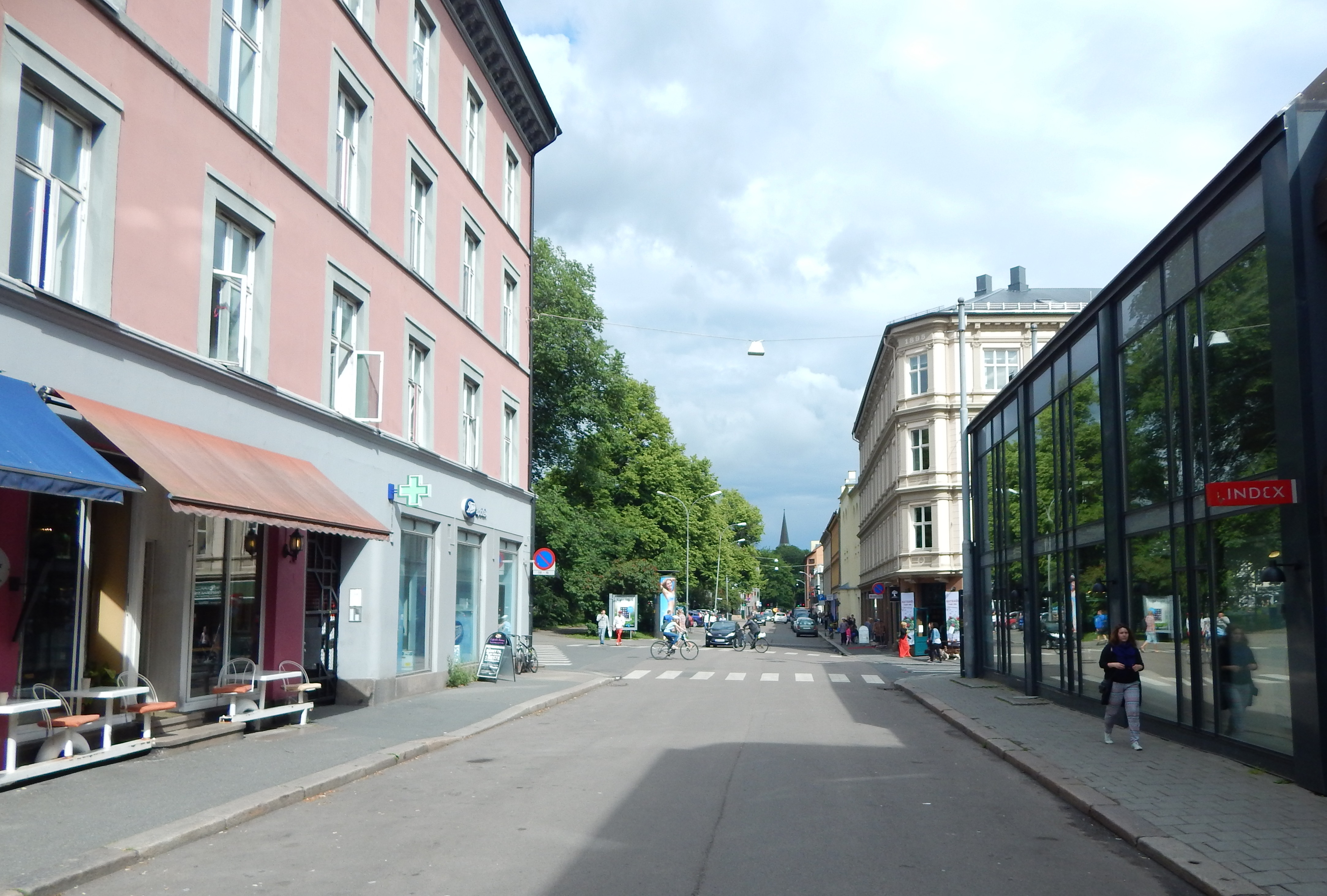 Sofienberggata